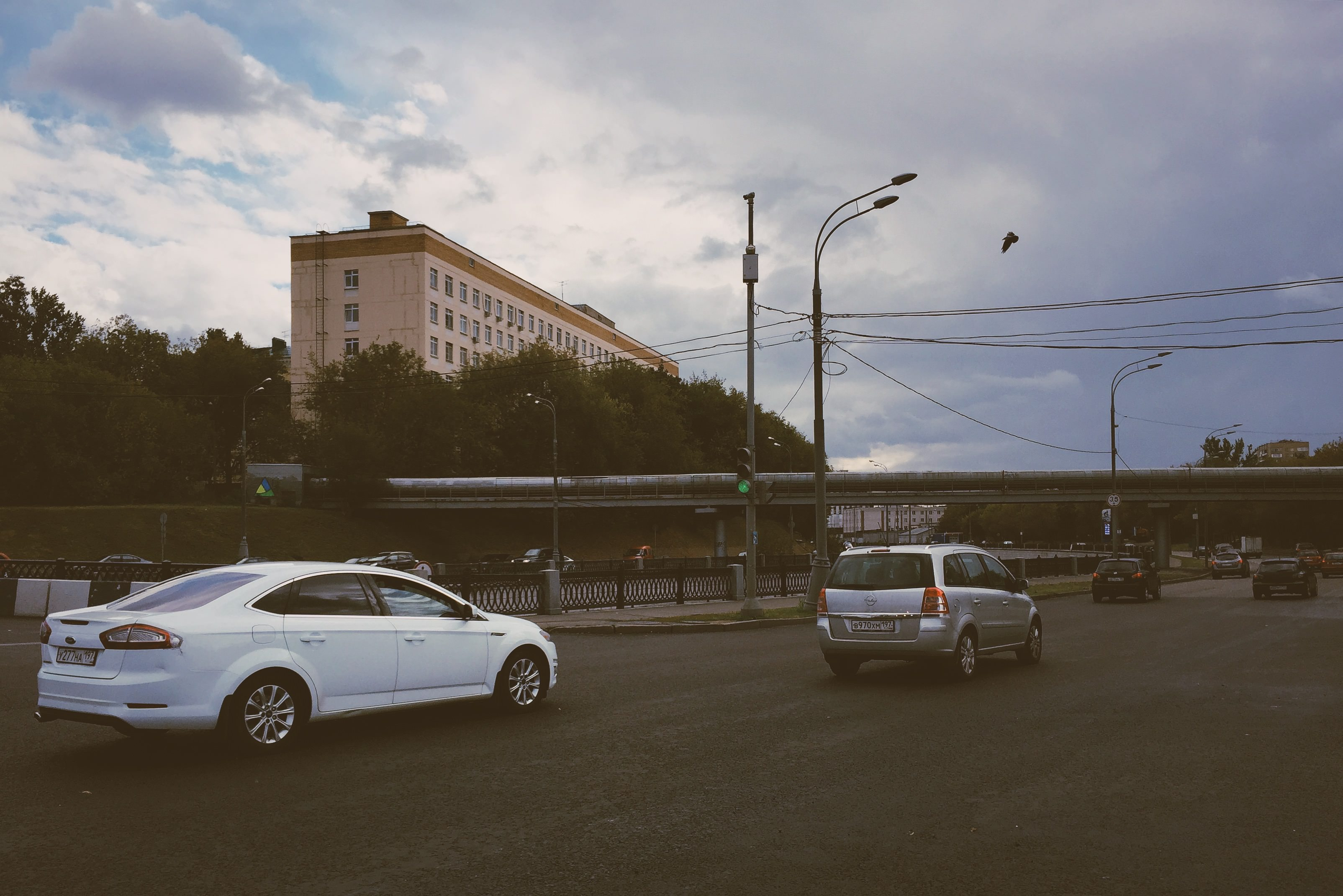 Северная оконечность Русаковской набережной. Вид на юг. Здание напротив - Московский научно-исследовательский институт психиатрии (территория больницы Ганнушкина)